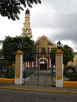 Iglesia de san jeronimo en Coatepec, Veracruz